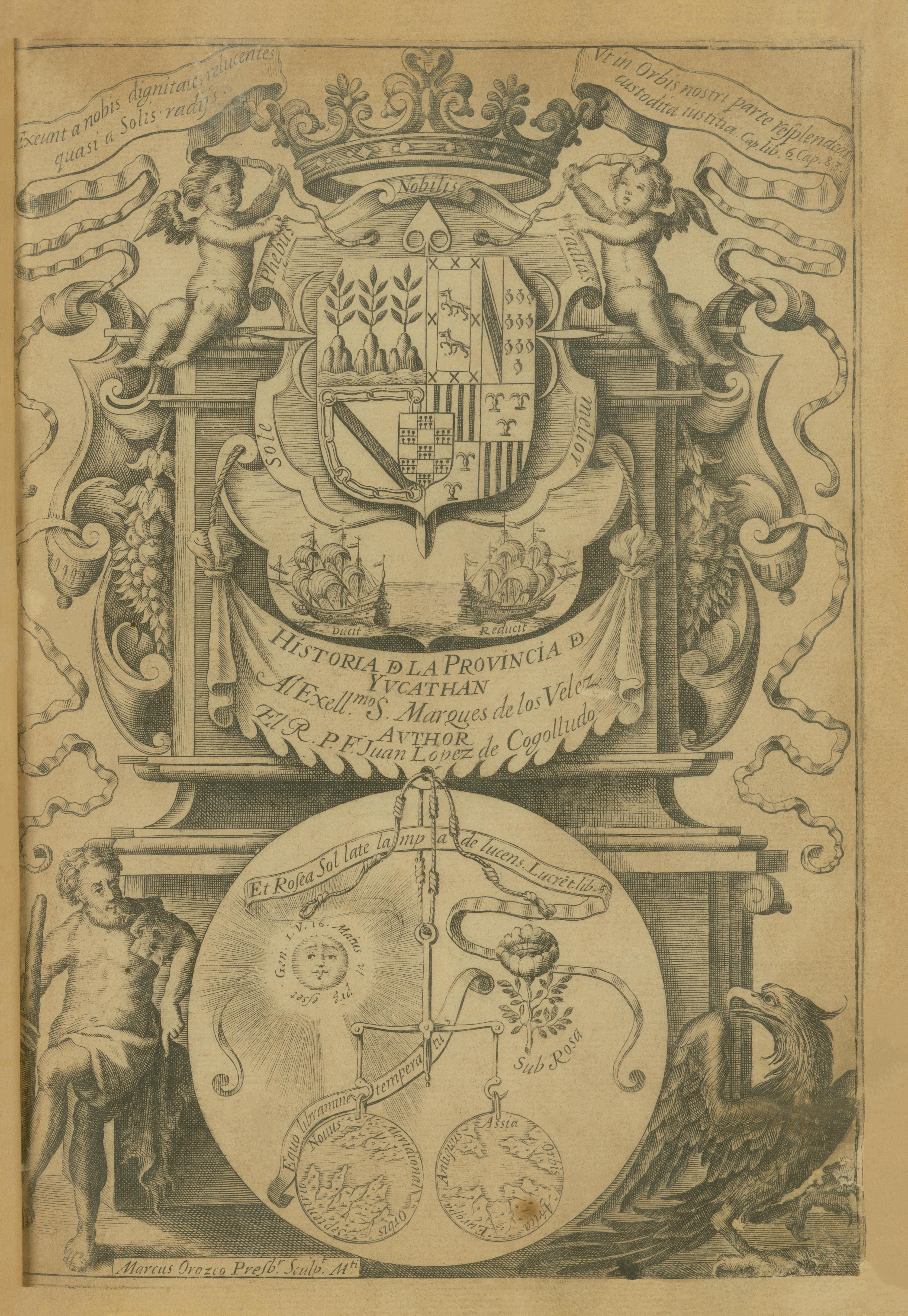 Portada del libro "Historia del Yucatán", de la primera edición publicada en Madrid por Diego López de Cogolludo en 1688.